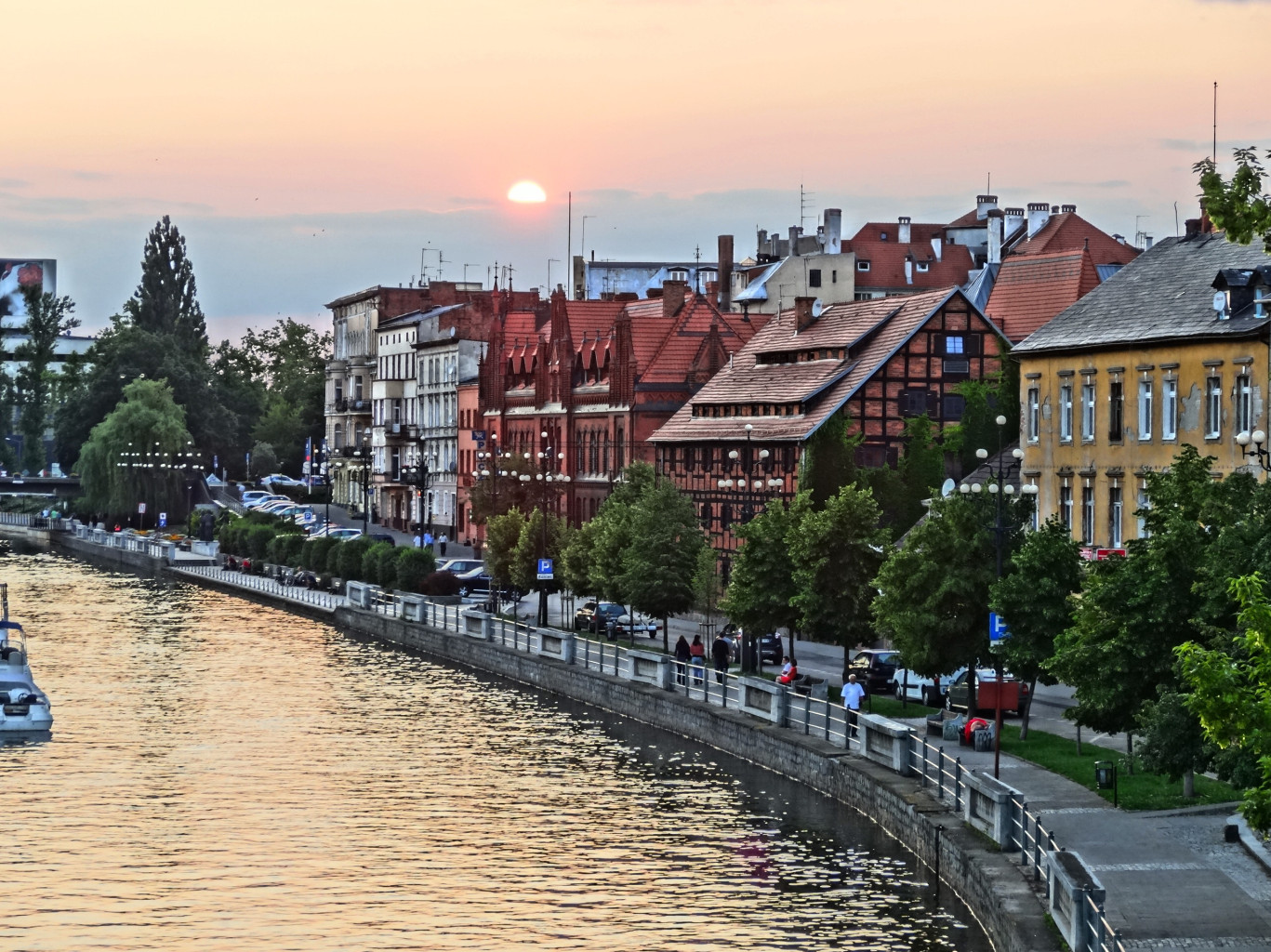 Północne nabrzeże Brdy w centrum Bydgoszczy - bulwar im. Zbigniewa Urbanyi